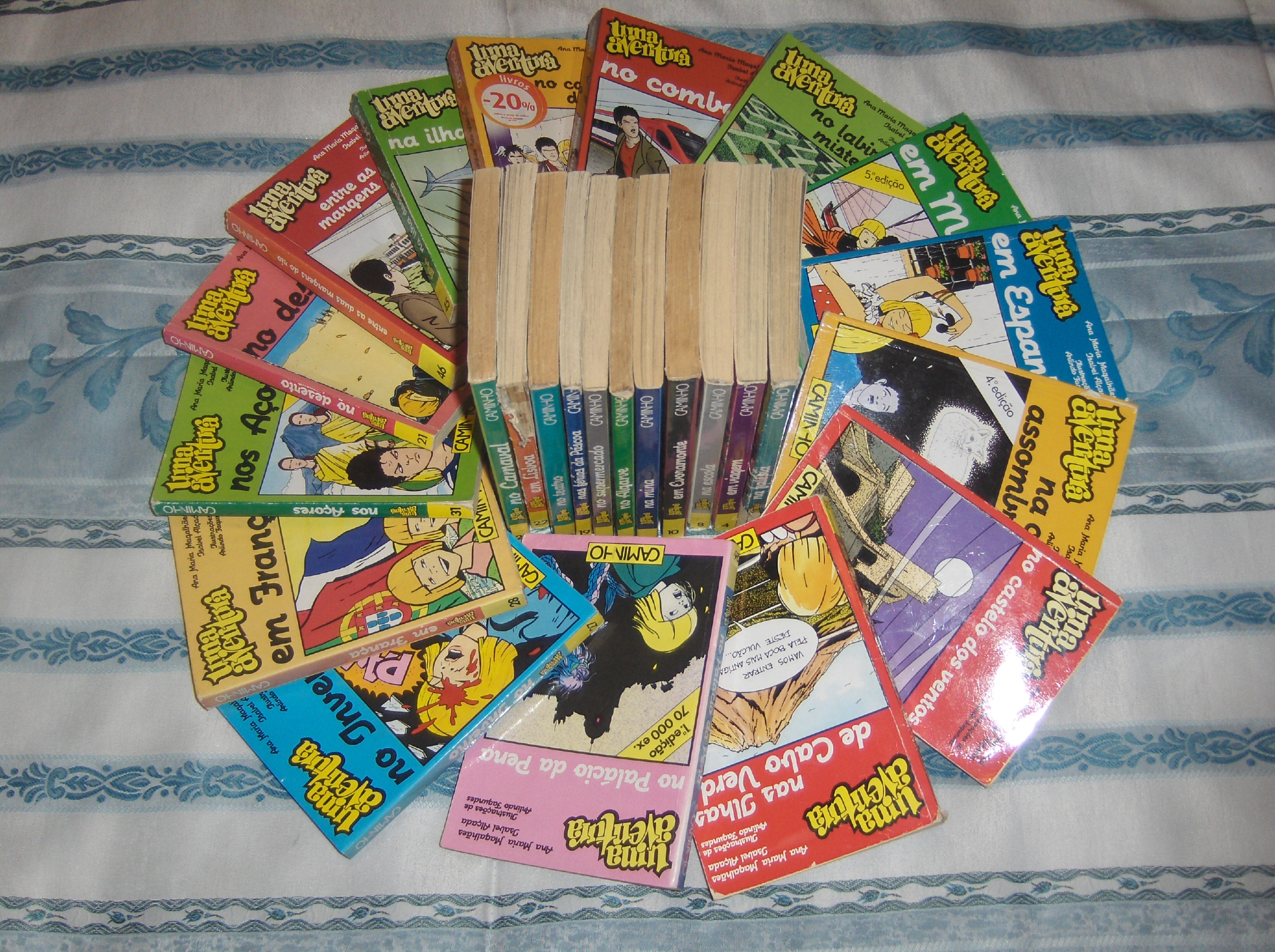 Alguns livros da colecção Uma Aventura.